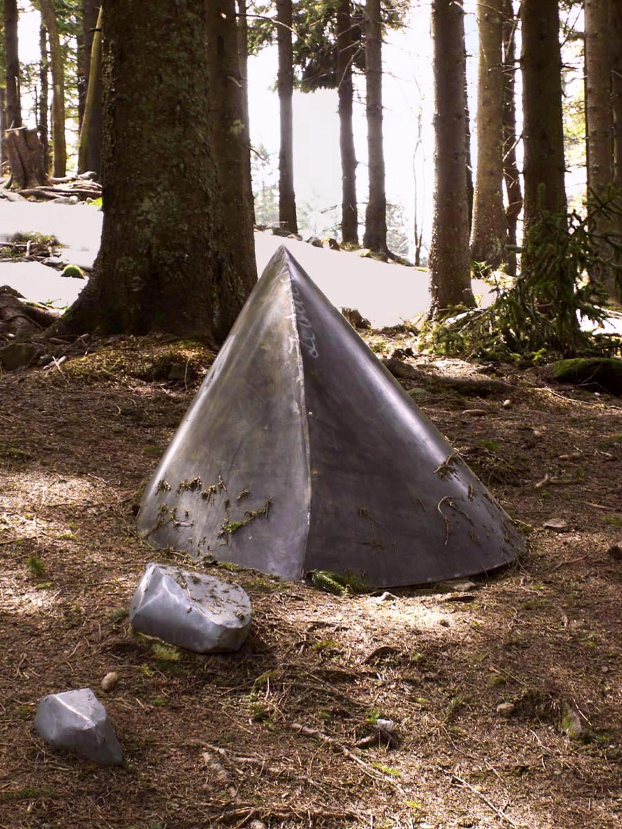 Reinhard Klessinger, Auf dem Weg zum Horizont, 1999, Kunstpfad am Mummelsee, Deutschland, Baden-Württemberg, Ortenau-Kreis